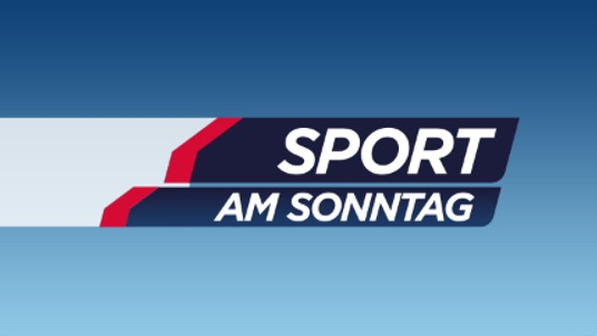 Das Logo der ORF-Sendung Sport am Sonntag